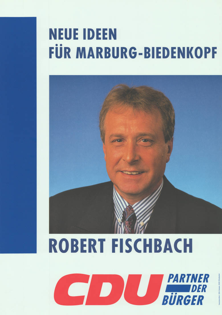 Neue Ideen für Marburg-Biedenkopf Robert Fischbach CDU Partner der Bürger Abbildung: Porträtfoto Plakatart: Kandidaten-/Personenplakat mit Porträt Auftraggeber: Verantw.: CDU Hessen, Wiesbaden Objekt-Signatur: 10-007 : 1006 Bestand: Landtagswahlplakate Hessen (10-007) GliederungBestand10-18: Landtagswahlplakate Hessen (10-007) » CDU Lizenz: KAS/ACDP 10-007 : 1006 CC-BY-SA 3.0 DE